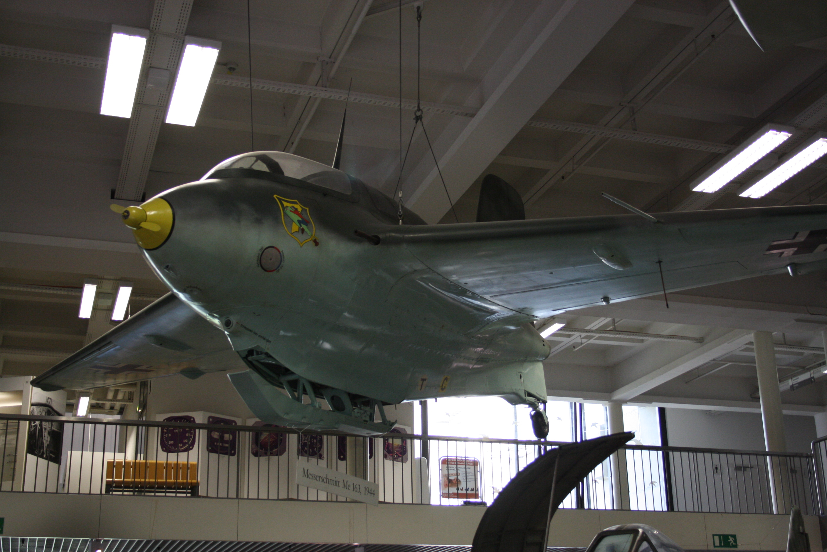 Messerschmitt Me 163, fotografiert im Deutschen Museum, München